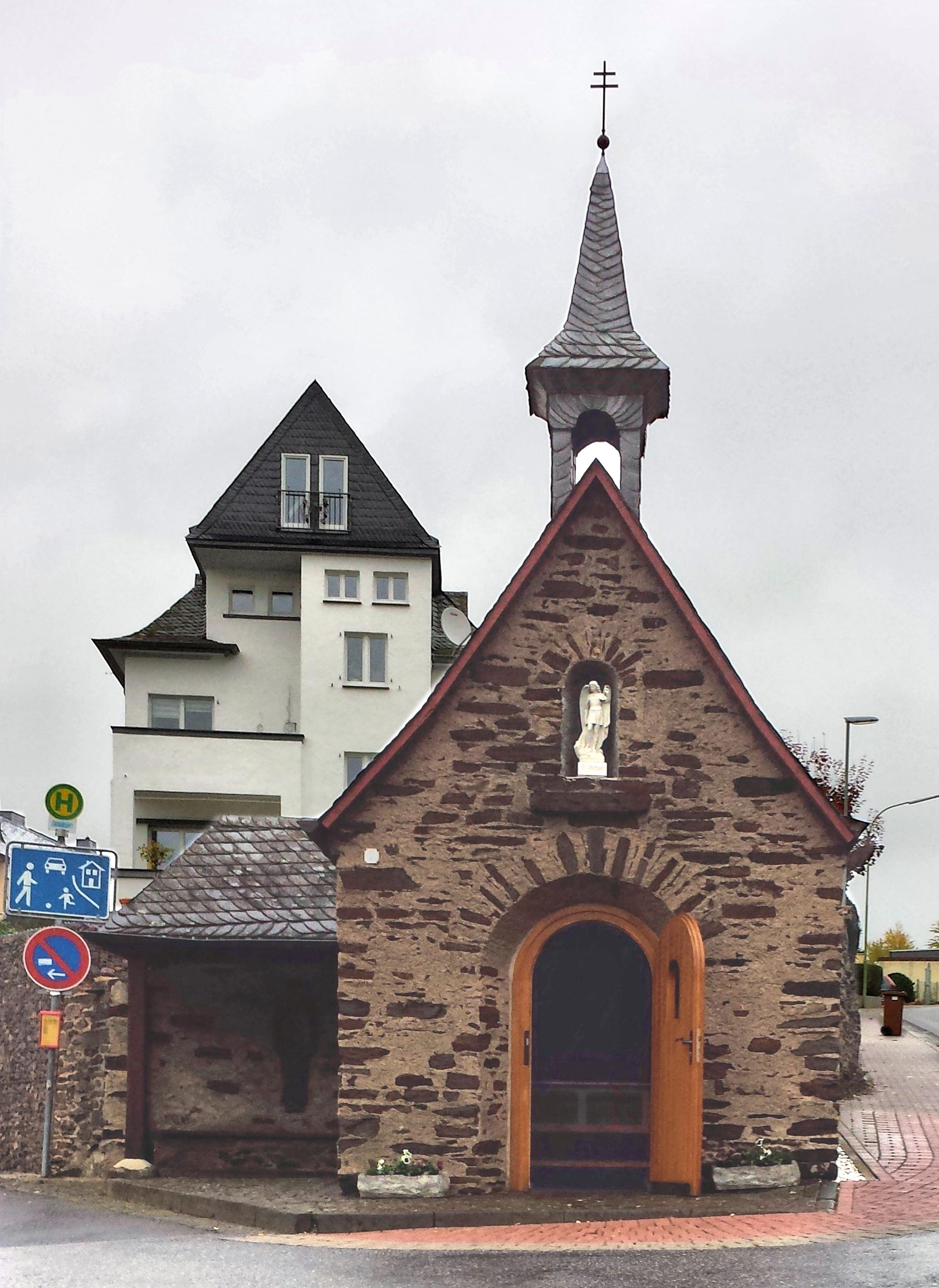 Kapelle